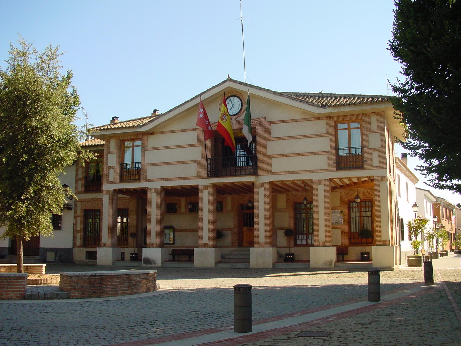 Ayuntamiento de Cubas de la Sagra.